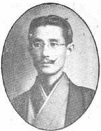 北一輝 代表的人物及事業 時事通信社 1913